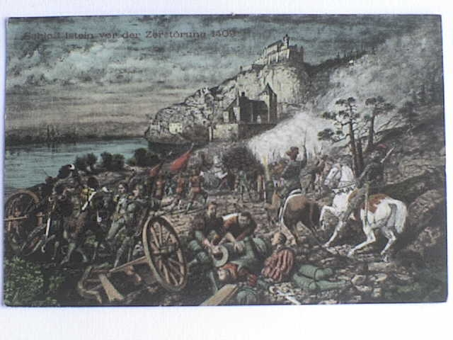 Super peinture montrant l'arrivée des soldats bâlois au Château d'Istein avant sa prise et sa destruction.